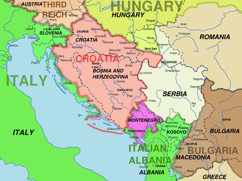 Western Balkans 1942 and 2008